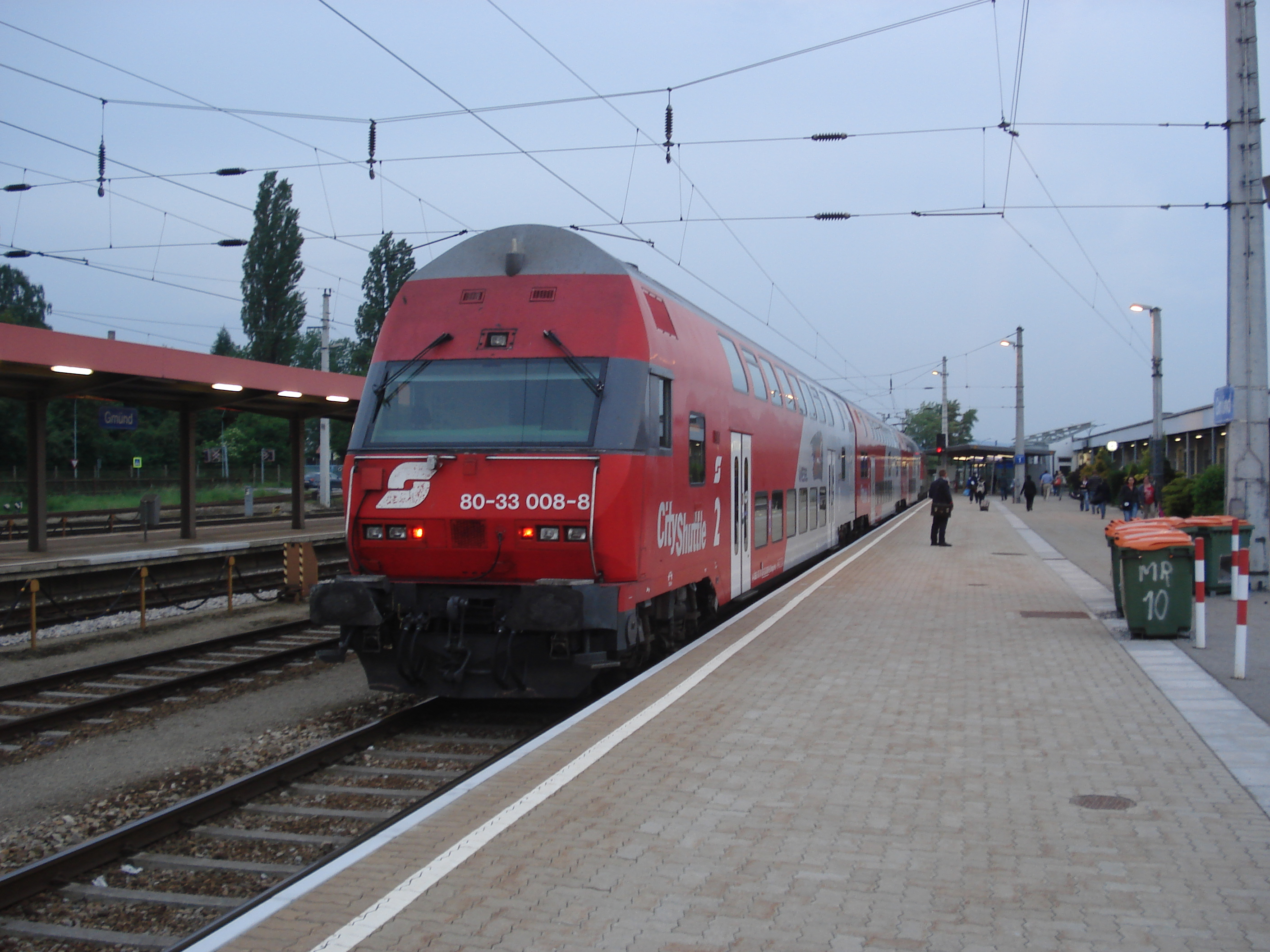 REX 2116 (ÖBB 1142 mit dreiteiligem Doppelstockzug "Wiesel") nach der Ankunft im Endbahnhof Gmünd NÖ.